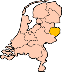 Ligging van de regio Twente.